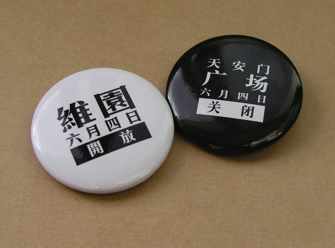 2007年六四襟章